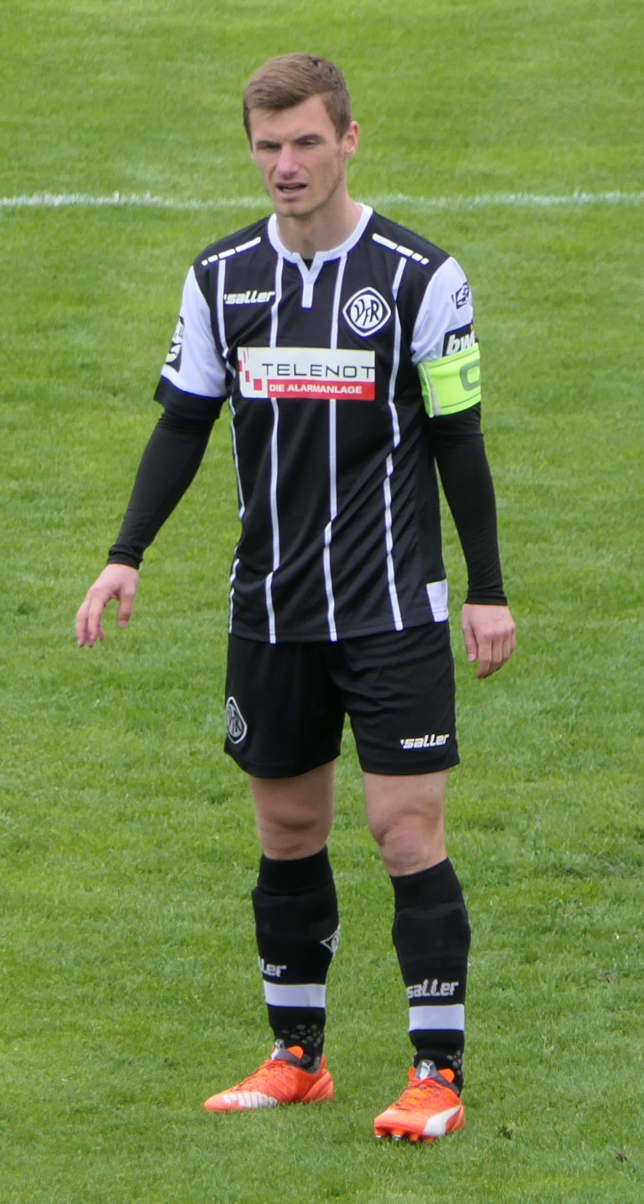 Der Fussballprofi Thomas Geyer im Trikot des VfR Aalen beim Heimspiel gegen Eintracht Braunschweig am 05.05.2019.